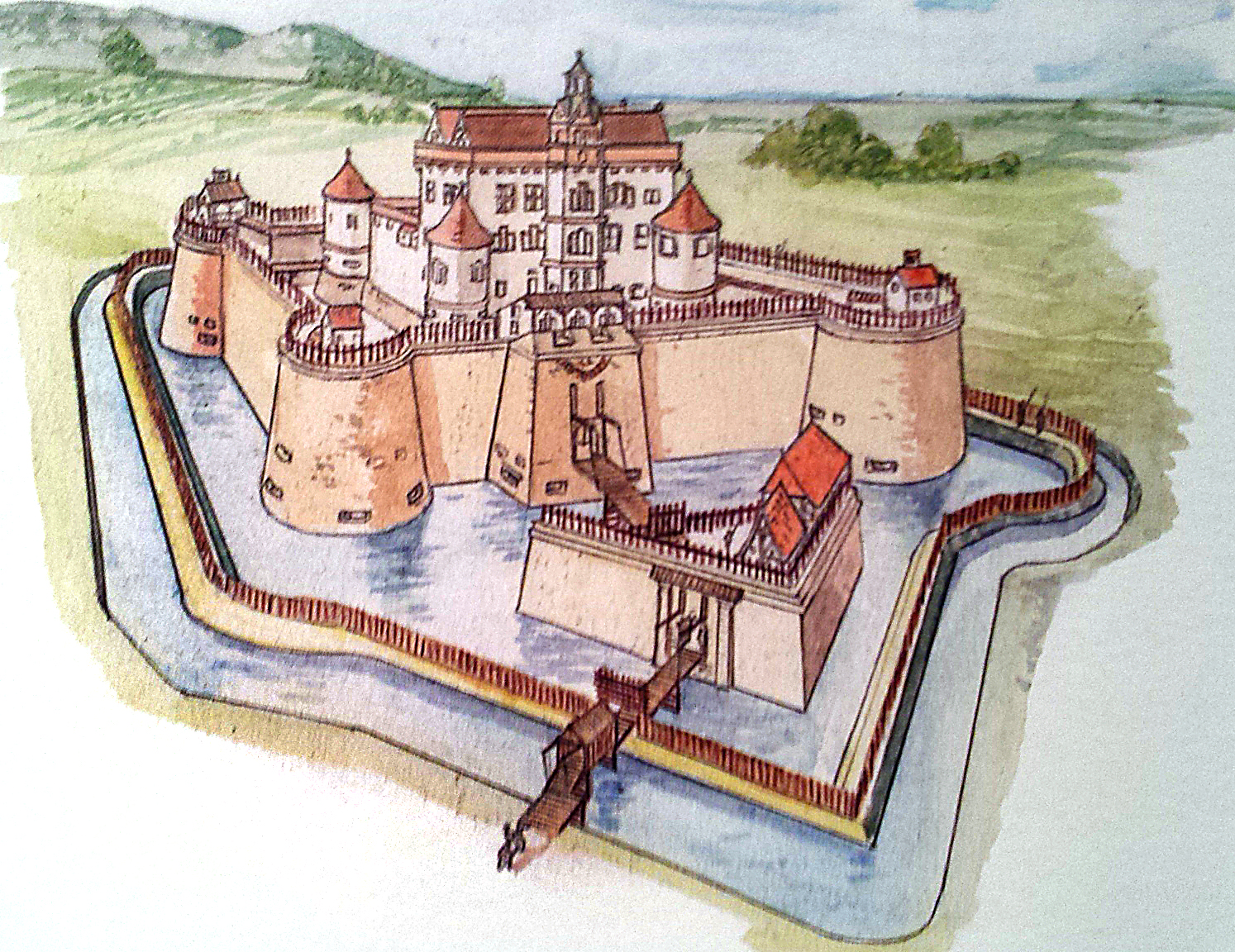 Château de Berrwiller dont les pierres ont servi à reconstruire celui de Hartmannswiller. Archive familiale. D'après un dessin paru dans J.Dietrich.